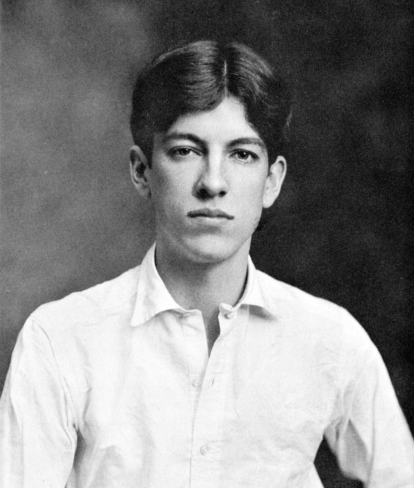 Portrait d'Alan Seeger